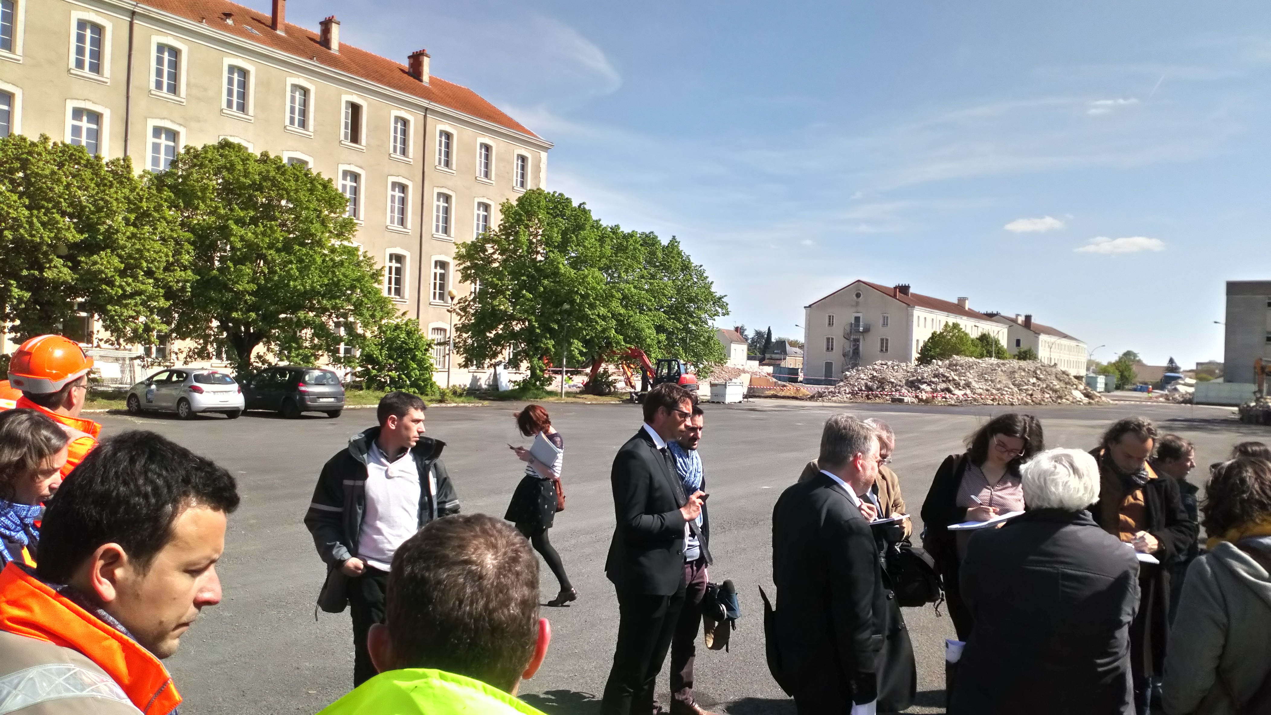 Conférence de presse à la Caserne Laage à Châtellerault